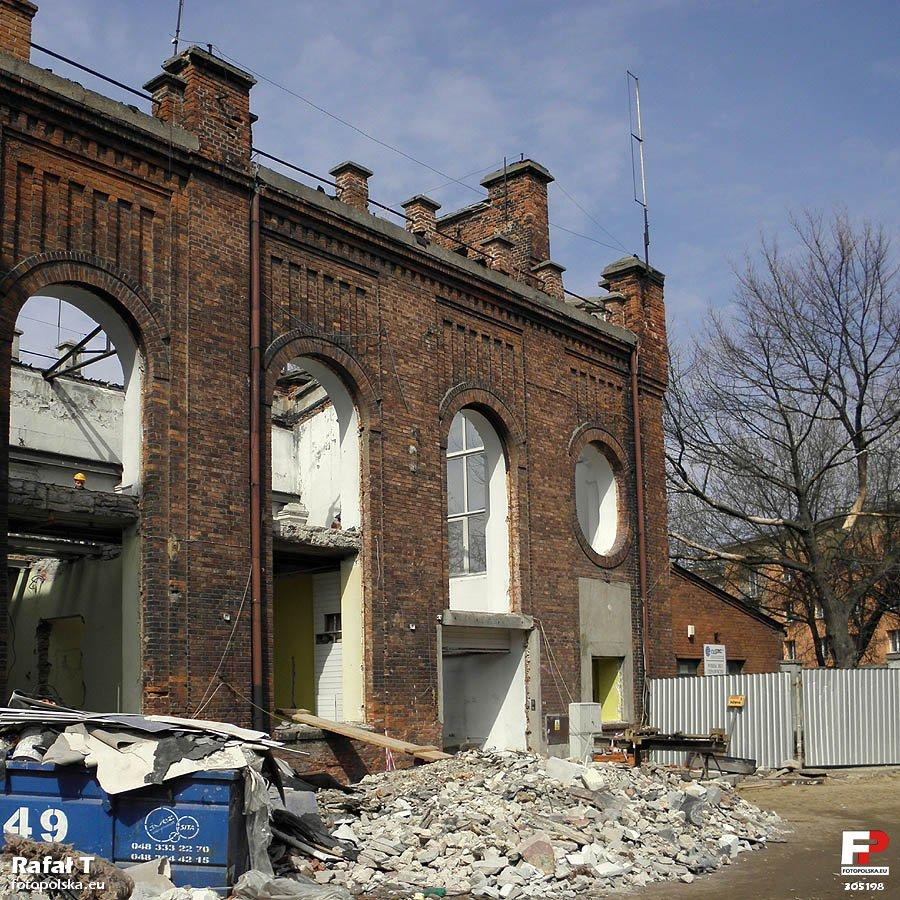 W miejscu gdzie leży gruz stał parowóz pełniący funkcję dodatkowego kotła.